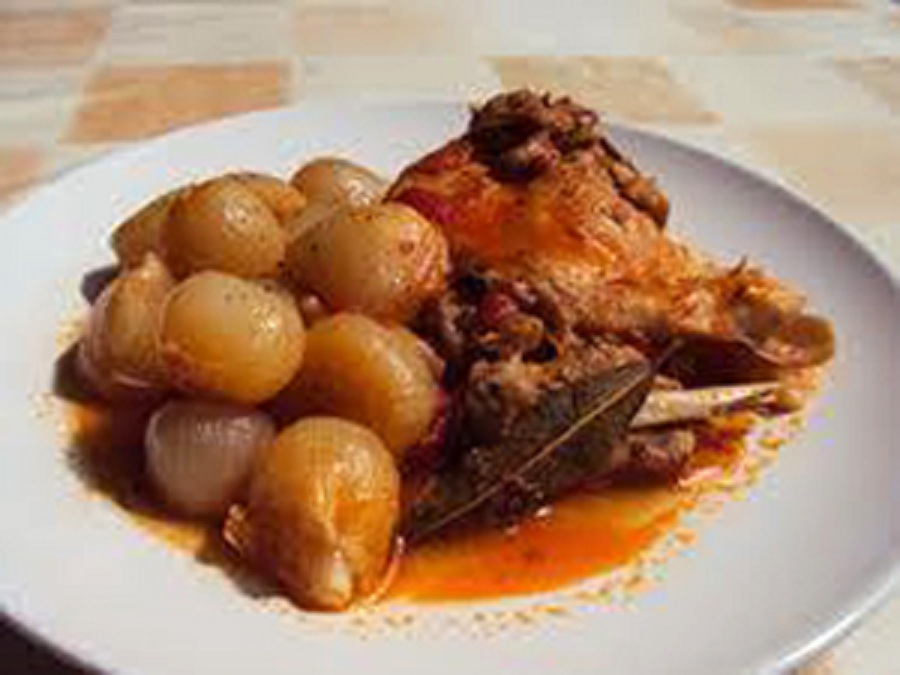 Gibelotte de lièvre aux oignons